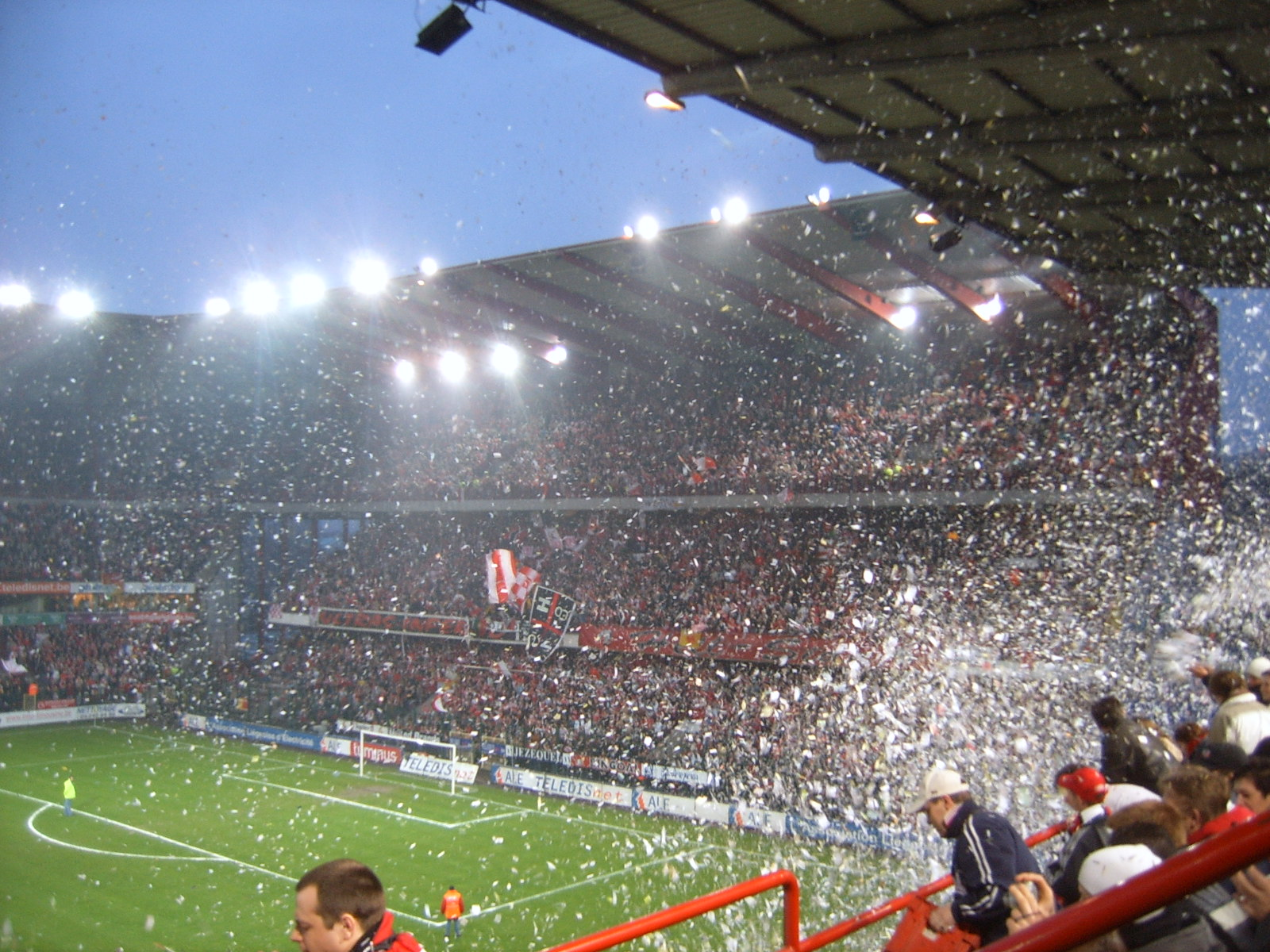 Stade de Sclessin du Standard de Liège match contre le Brussels, avril 2006